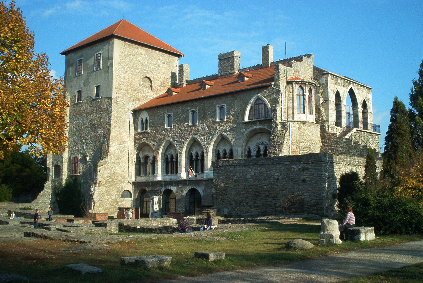 Château de Tata (Hongrie), deuxième photo